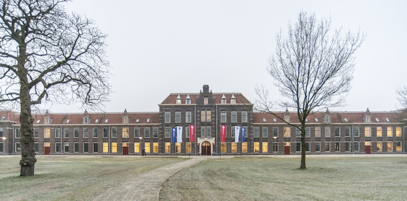 Akoesticum, nationaal trainingscentrum voor muziek, dans en theater.